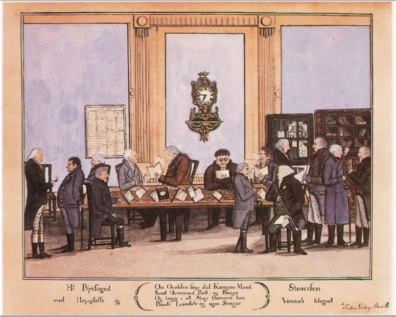 Drejers Klub tegnet av den danske kunstneren F.L. Bernth (1775 - 1823) i 1817.